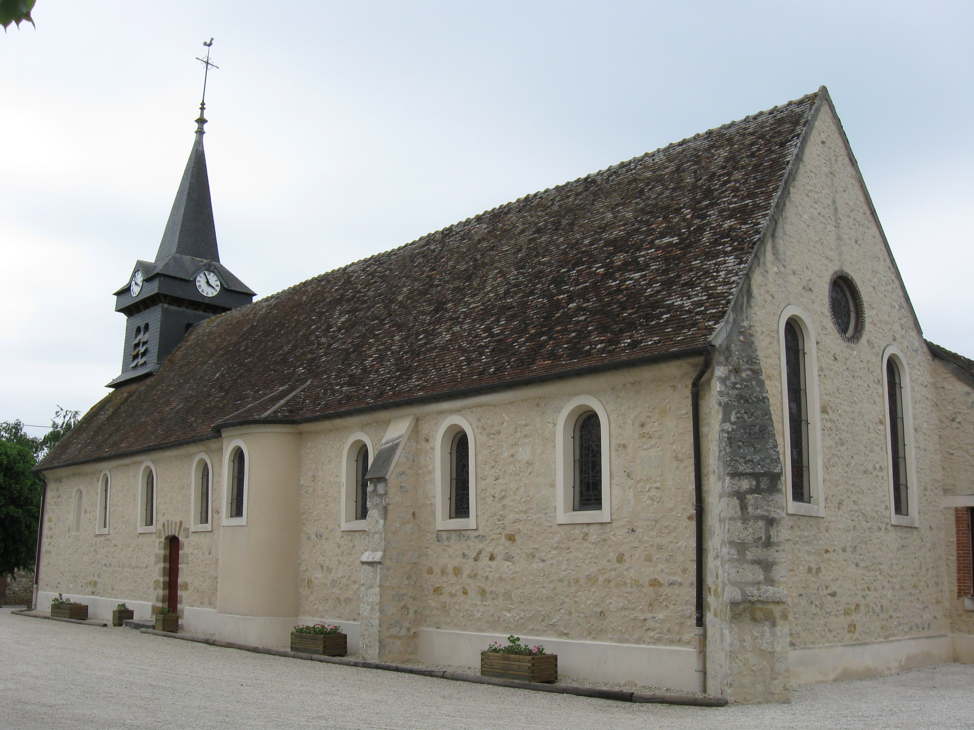 Église Saint-Martin de Luisetaines. (Seine-et-Marne, région Île-de-France).